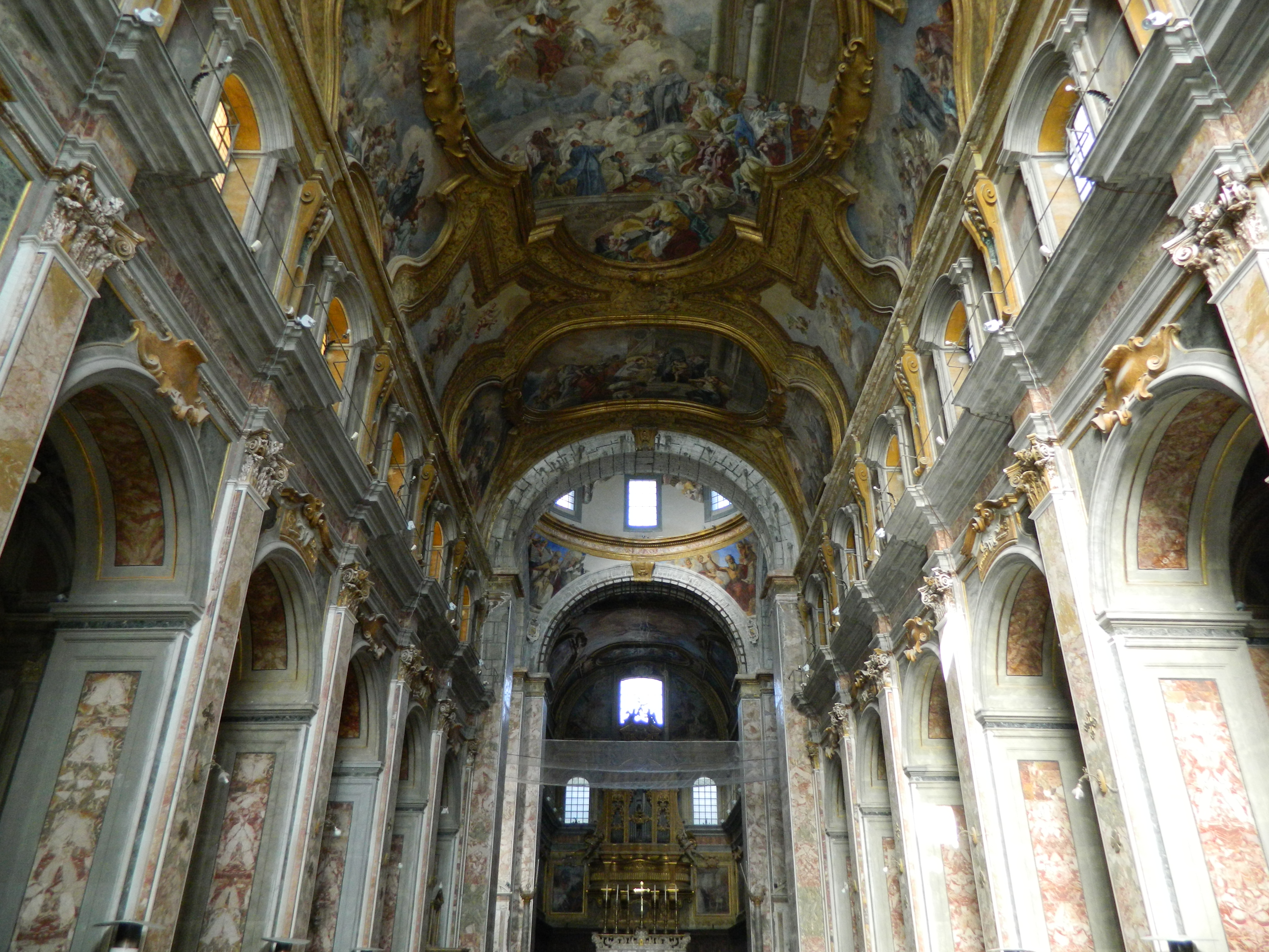 Chiesa dei santi Severino e Sossio di Napoli - Interno